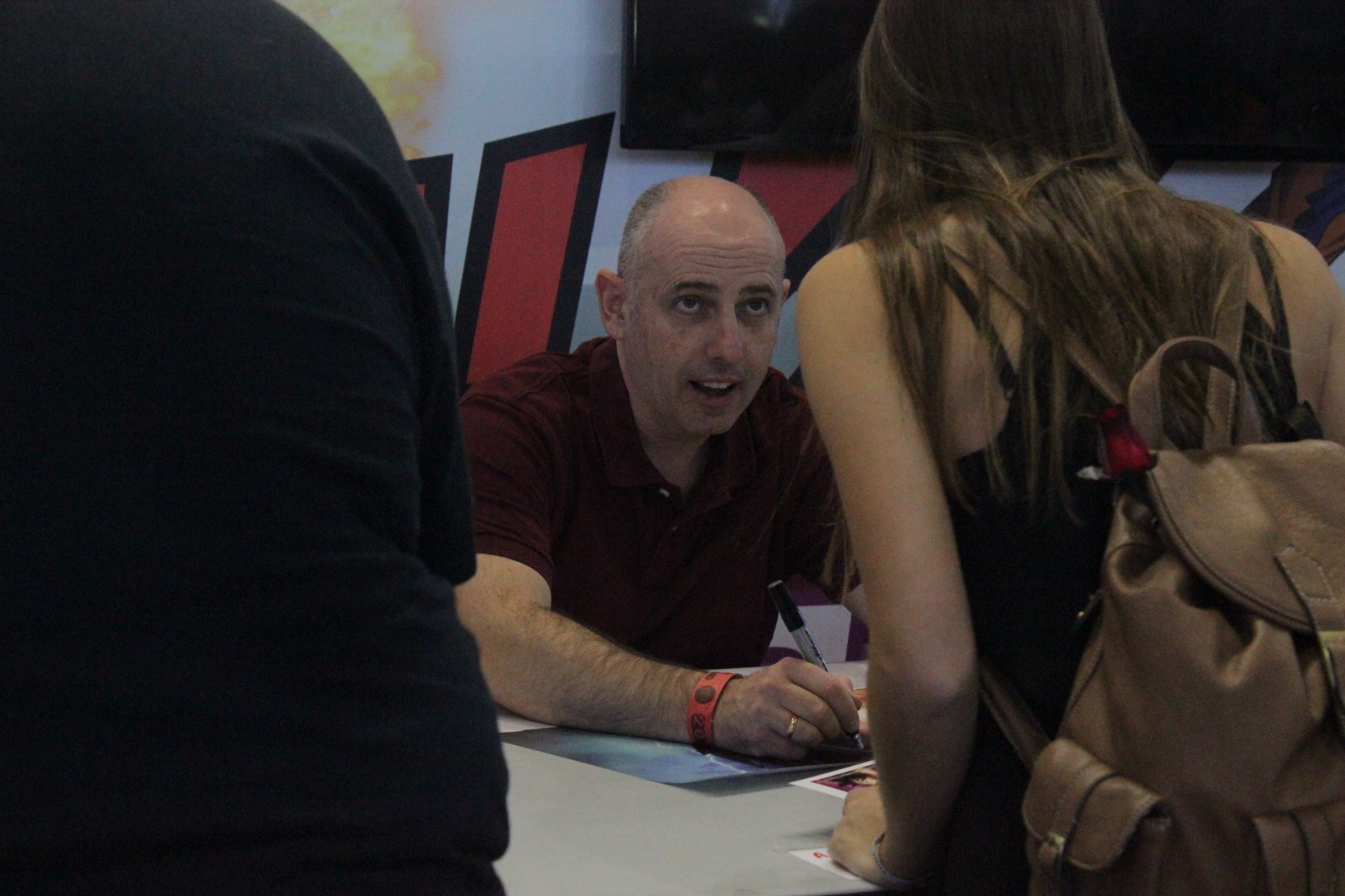 Doblador de Dragon Ball Z Alberto Hidalgo (Vegeta)